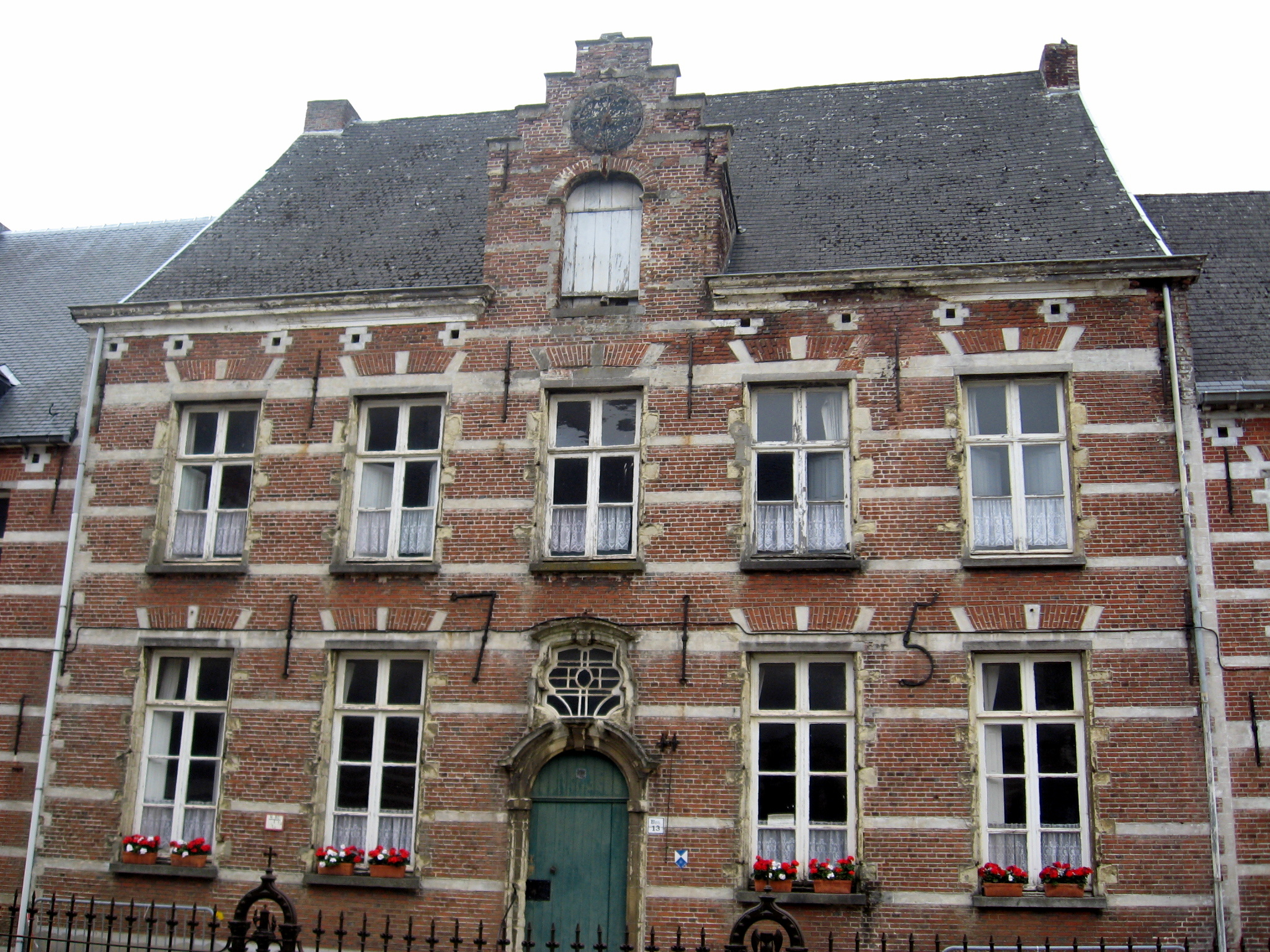 Dubbelhuis, infirmerie, Begijnhof 13 in Herentals